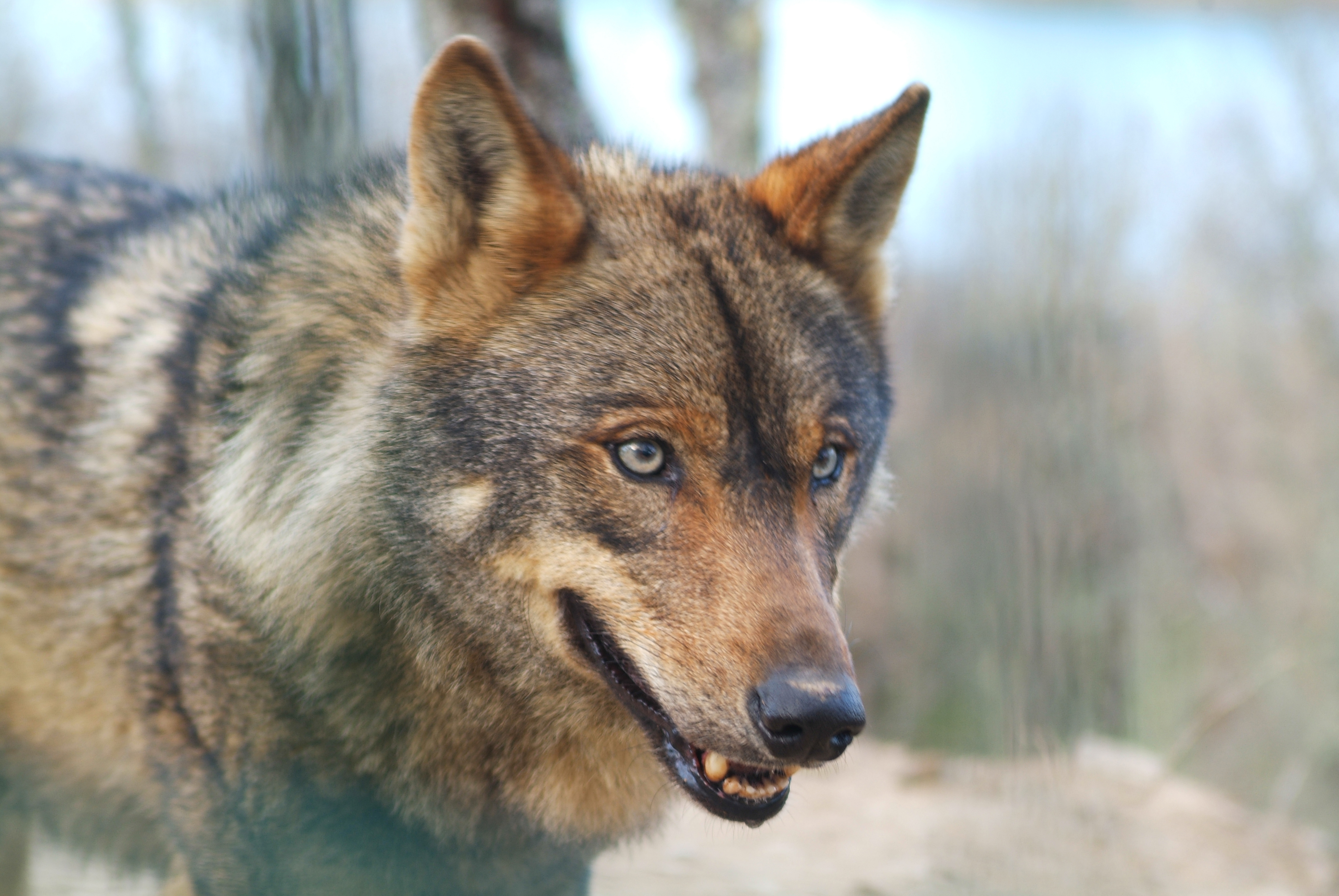 Lobo en el parque del Museo de la fauna salvaje de Boñar